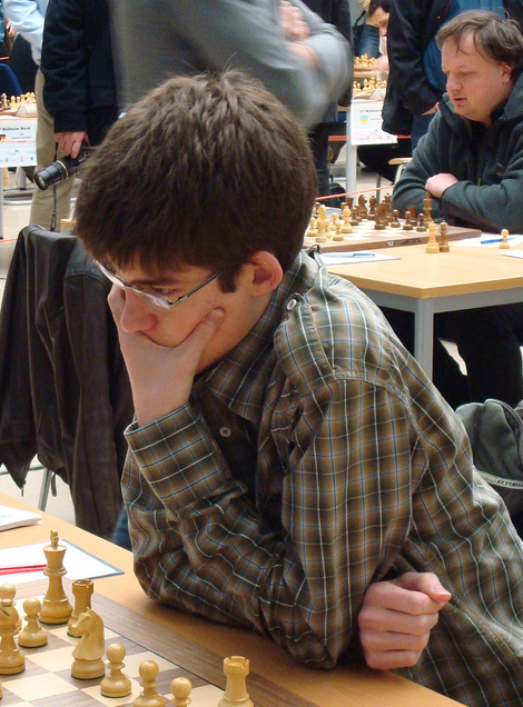 IM Robin Swinkels Netherlands, Schachbundesliga 2008